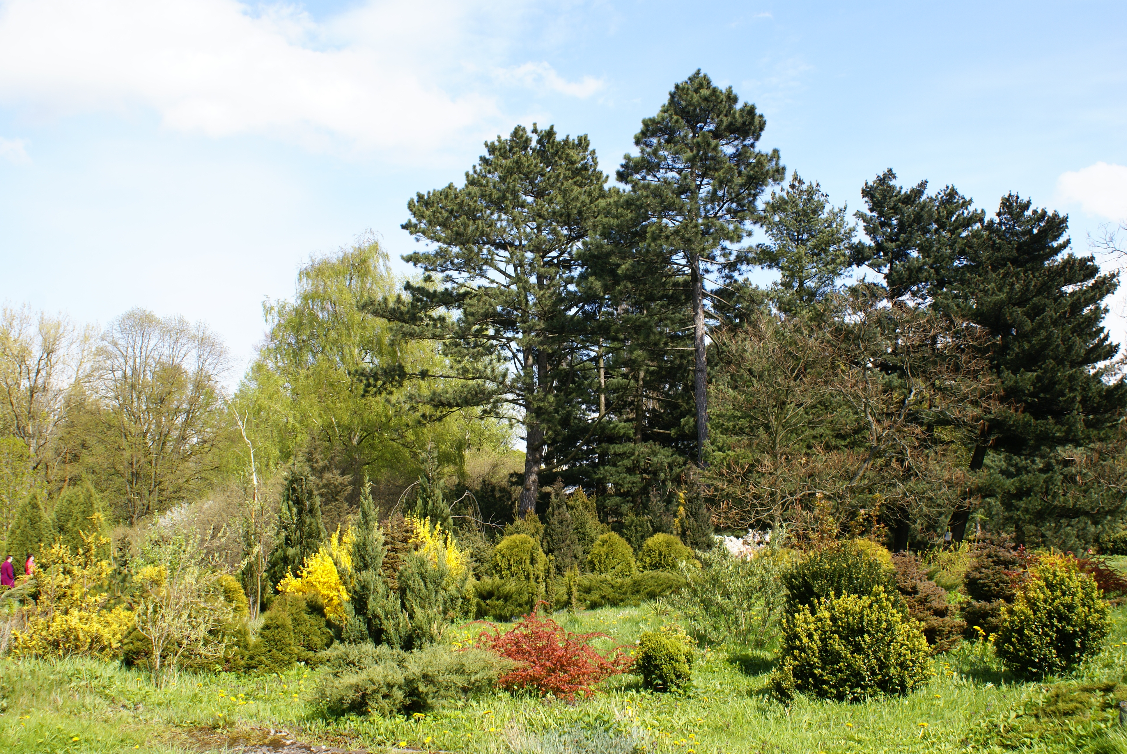 Ботанический сад Балтийского федерального университета имени Иммануила Канта, Калининград This image is related to the protected area of Russia number 3900050